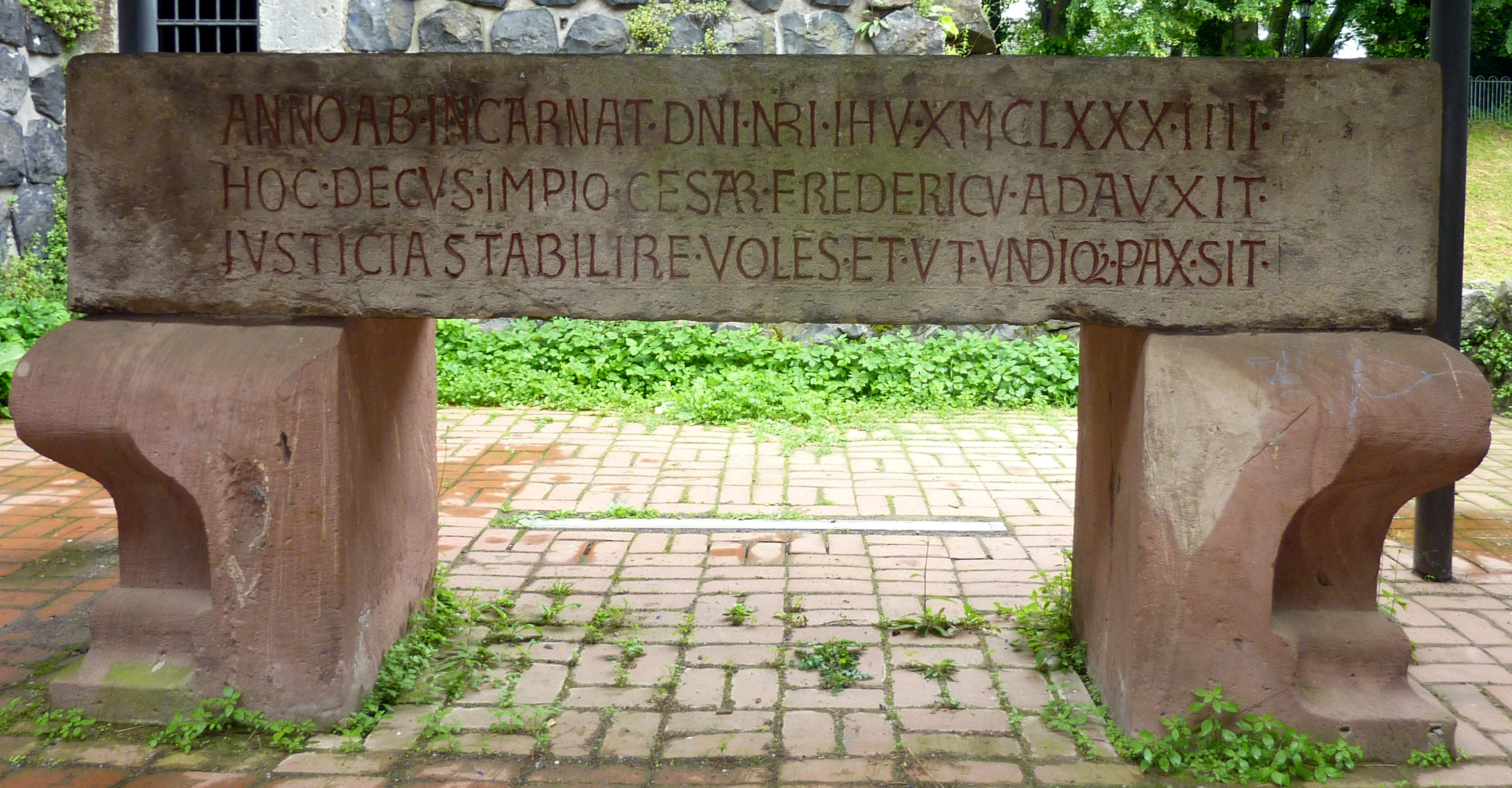 Kaiserswerther Pfalz - Gedenkstein an Kaiser Friedrich I. Barbarossa